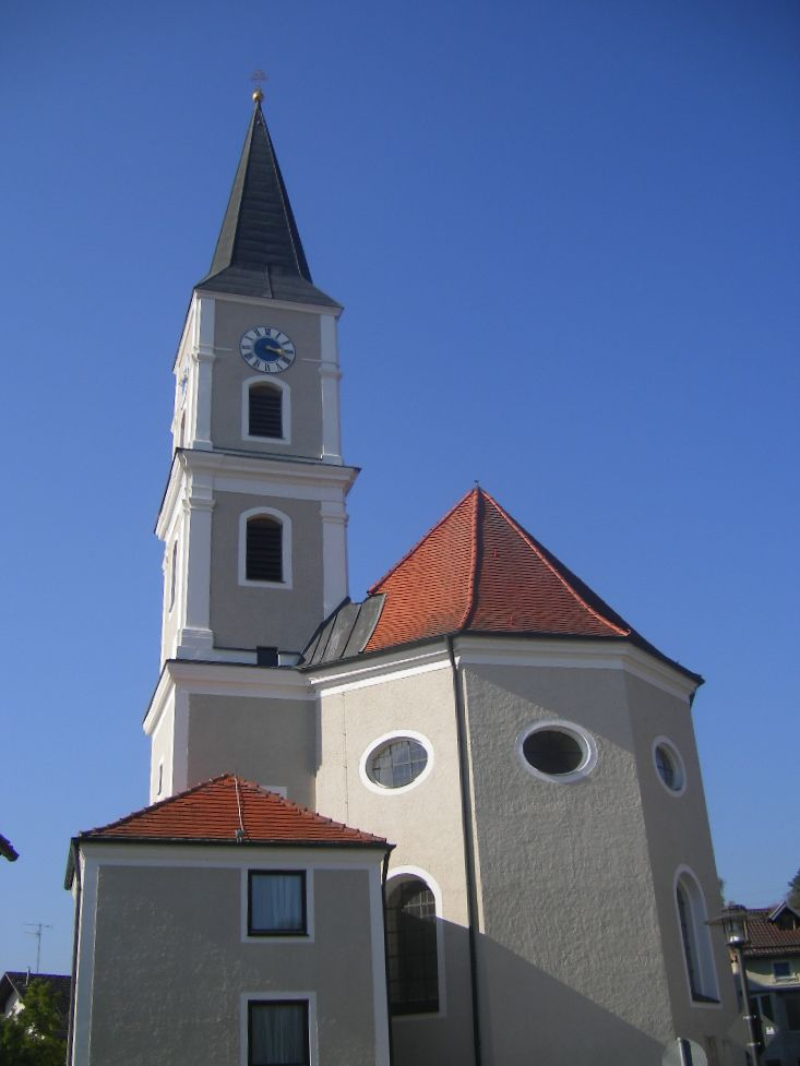 Winzer